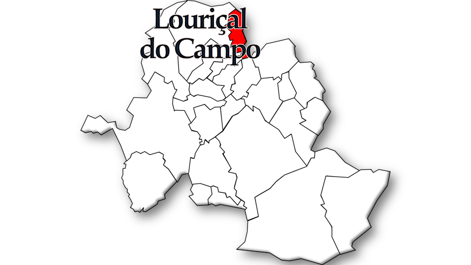 População